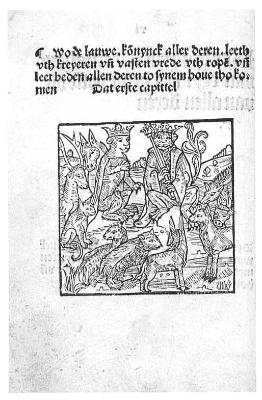 Reynke de vos: Incipit der Lübecker Inkunabel von 1498